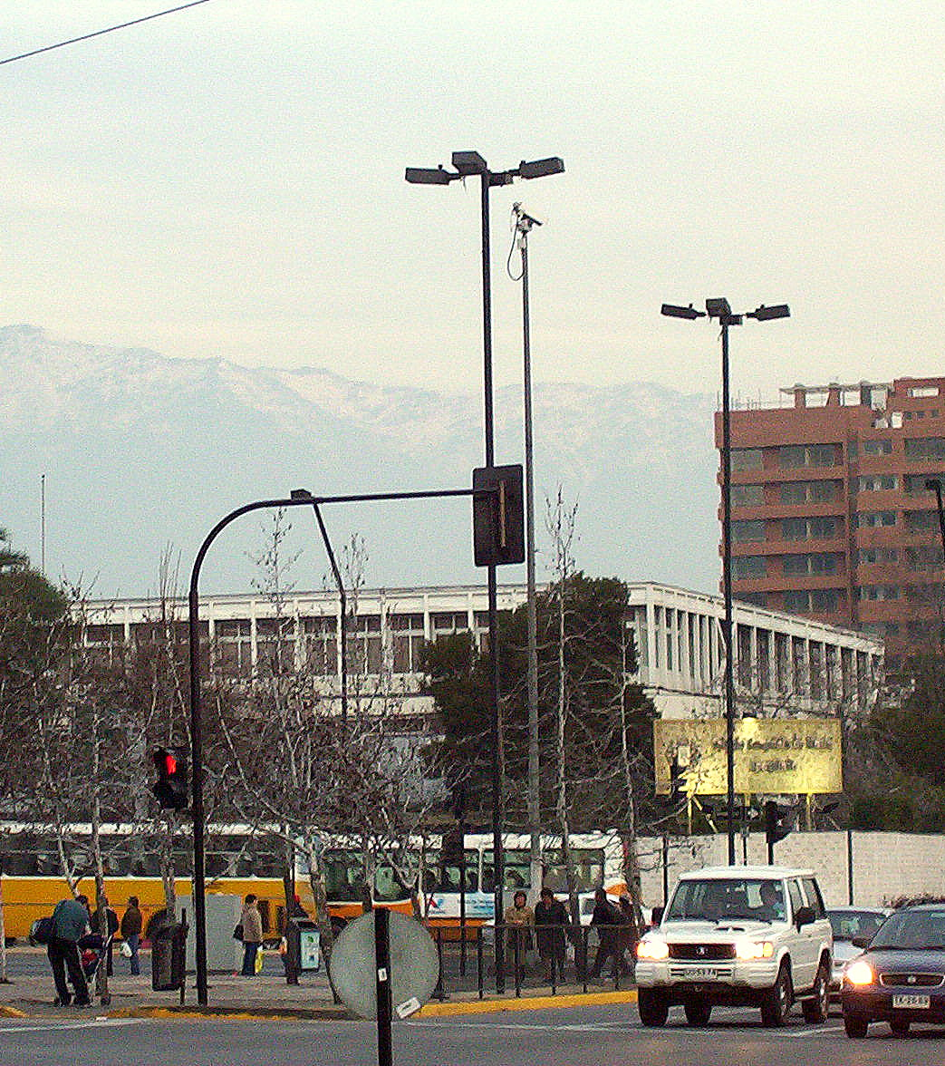 Compañia de María de Apoquindo en la esquina de la Avda Manquehue con Avda Apoquindo. Atras el Macizo de Ramón